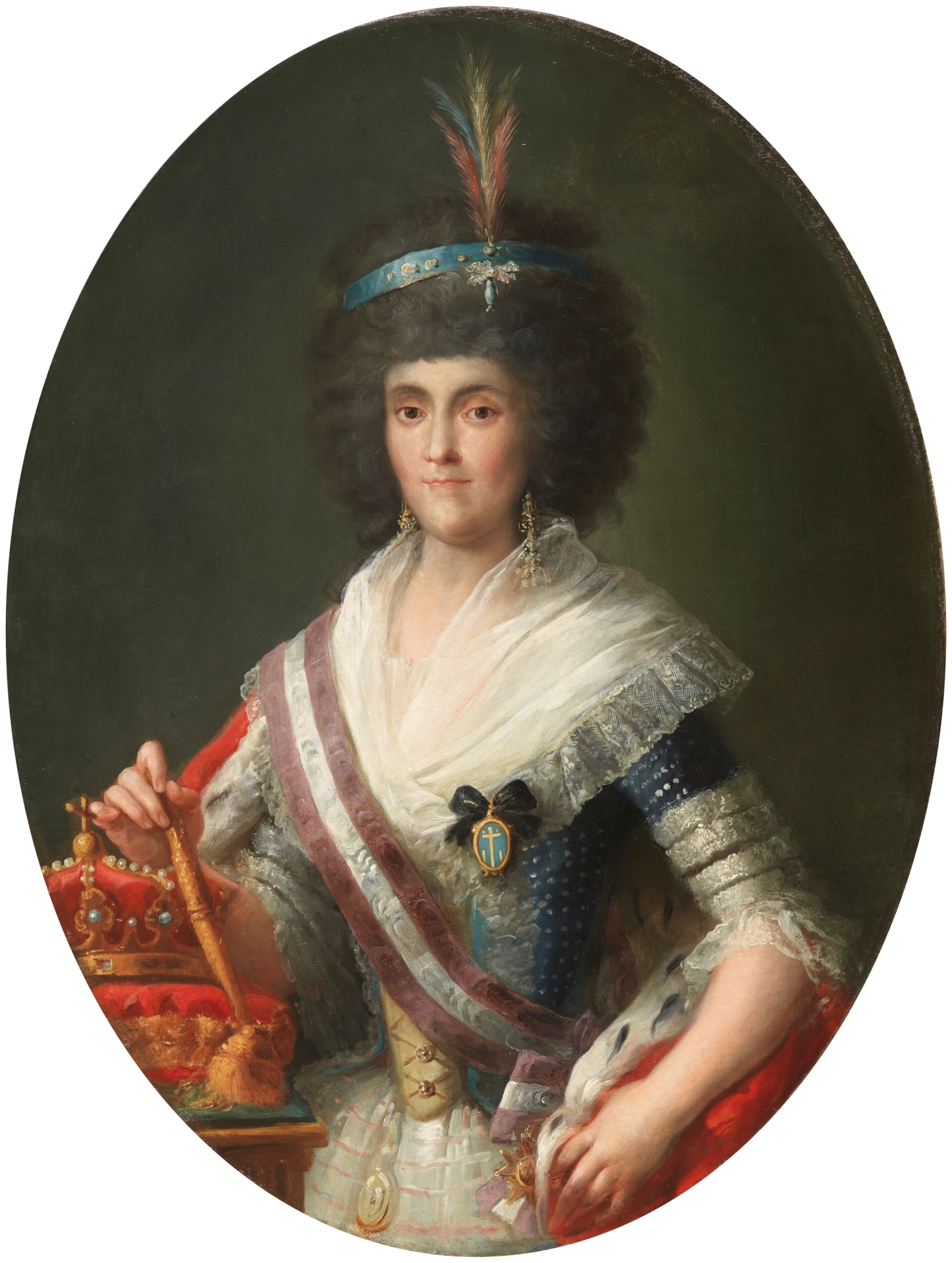 Retrato de la reina María Luisa de Parma (1751-1819), que fue reina consorte de España por su matrimonio con el rey Carlos IV de España.